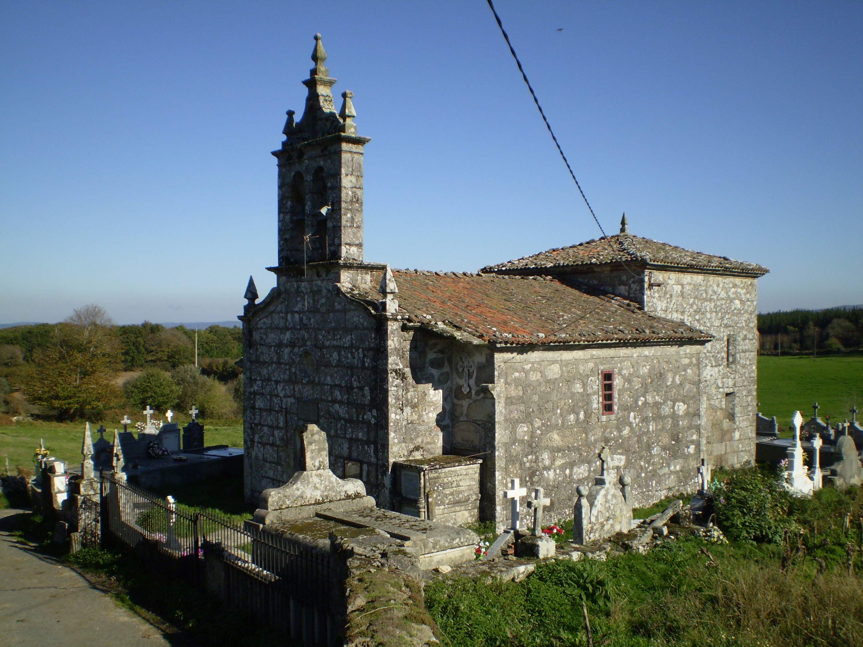 Igrexa de Agüela (Antas de Ulla)